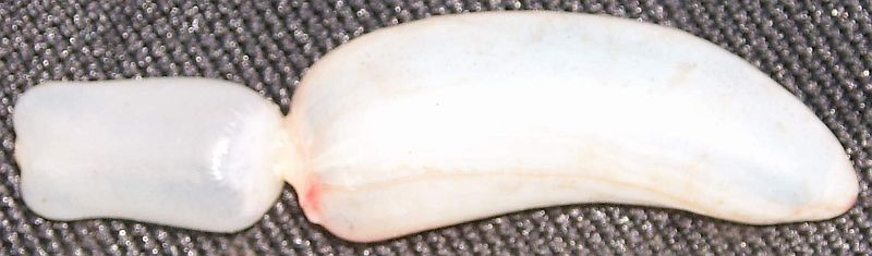 Swim bladder of a Ruddy (Scardinius erythrophthalmus)